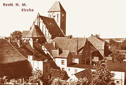 Recz ok. 1900Reetz, Neumark about 1900